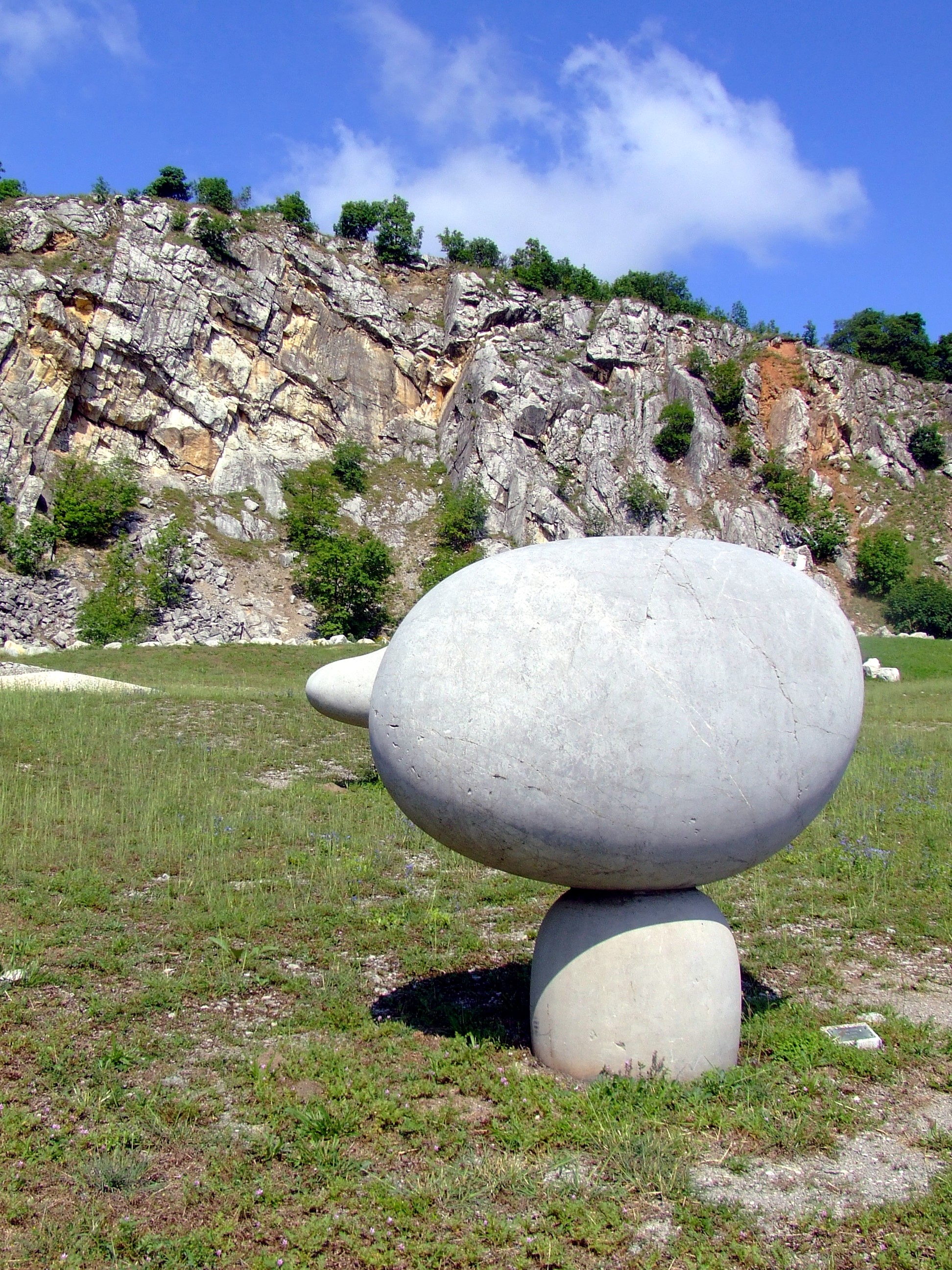 Bencsik István Pulzár című műve (beremendi szürke mészkő, 1972) a villányi (nagyharsányi) szabadtéri szoborparkban